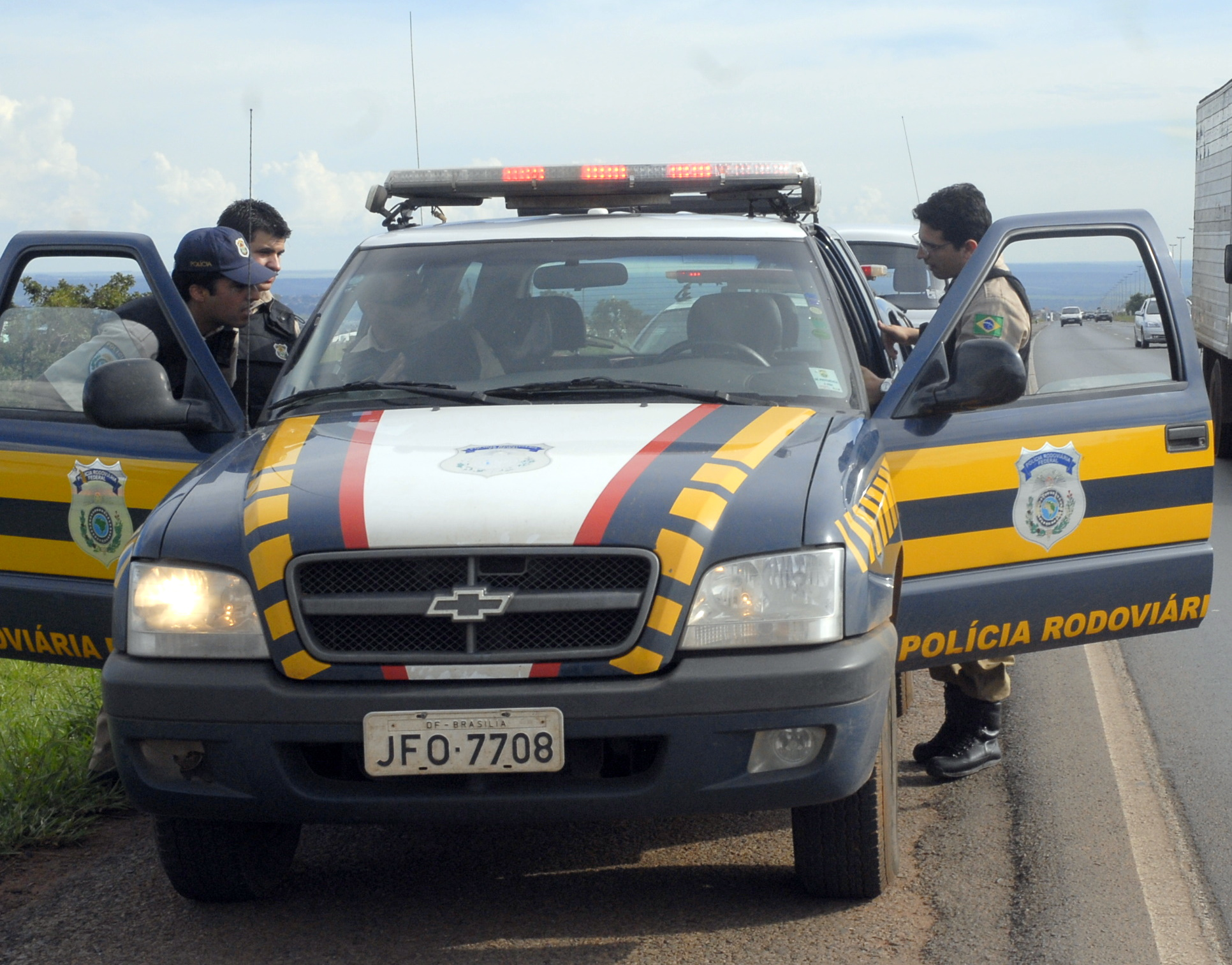 Chevrolet Blazer (viatura da Polícia Federal Rodoviária do Brasil)